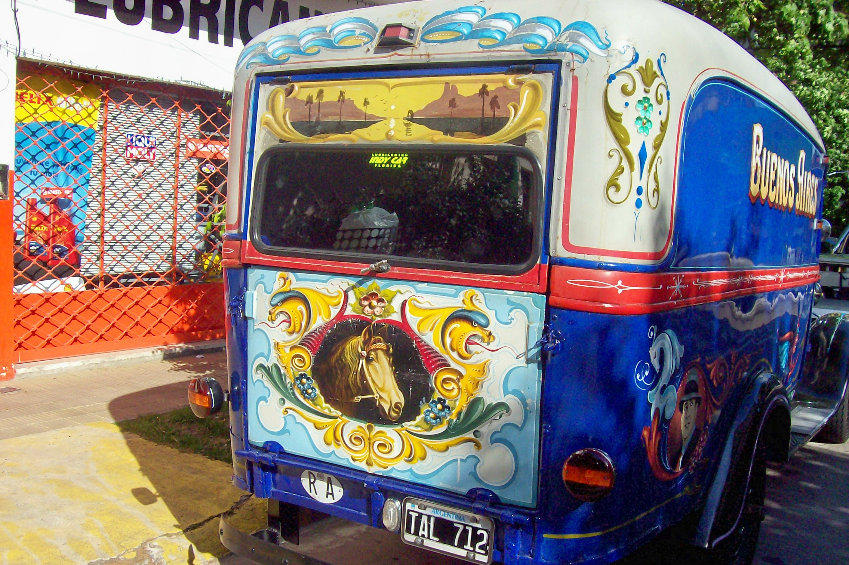 Camión Ford modelo 31 doble A, del año 1931 con Fileteado porteño, en Olivos, (Buenos Aires).